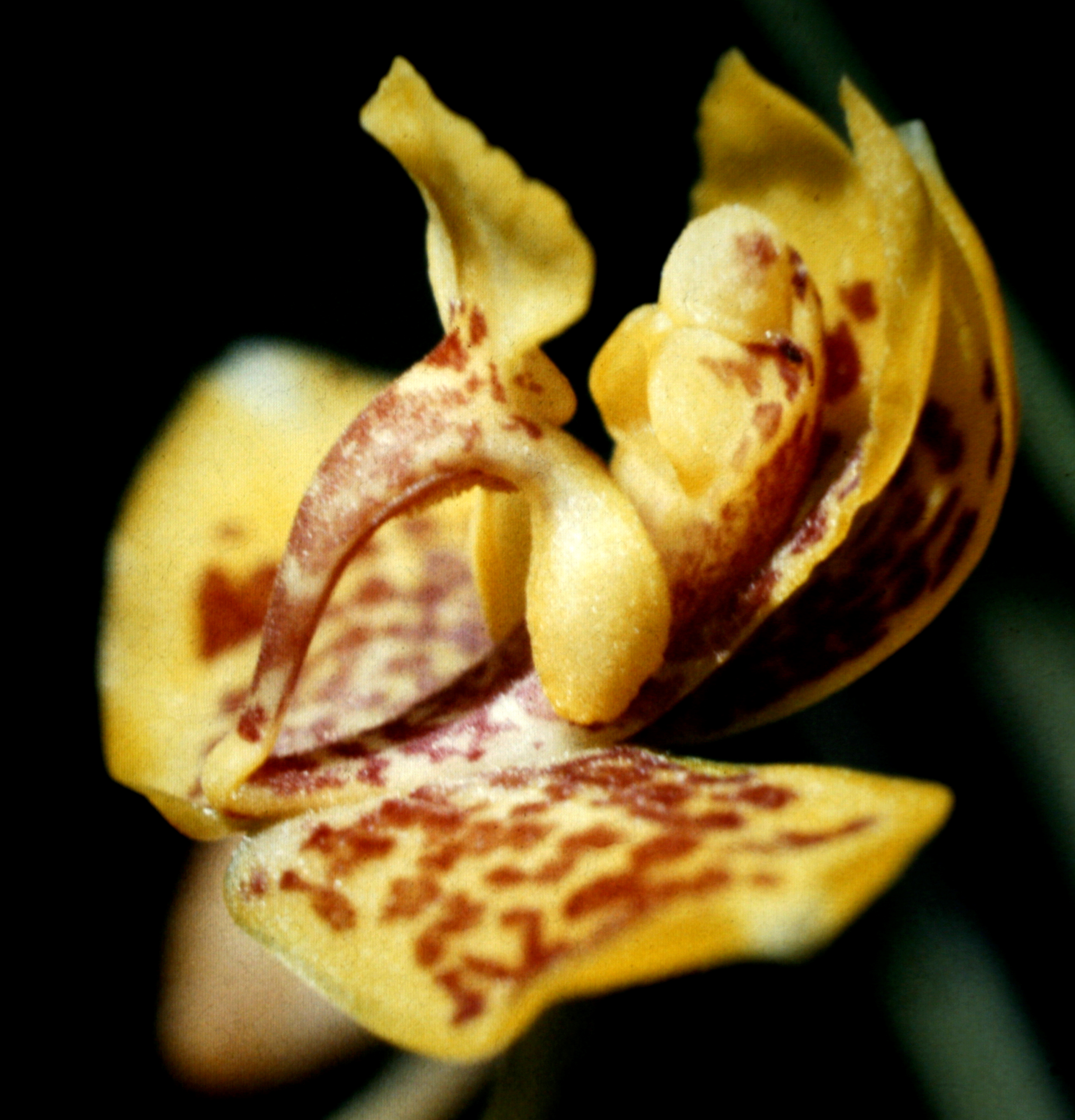 Rudolfiella aurantiaca, Suriname.